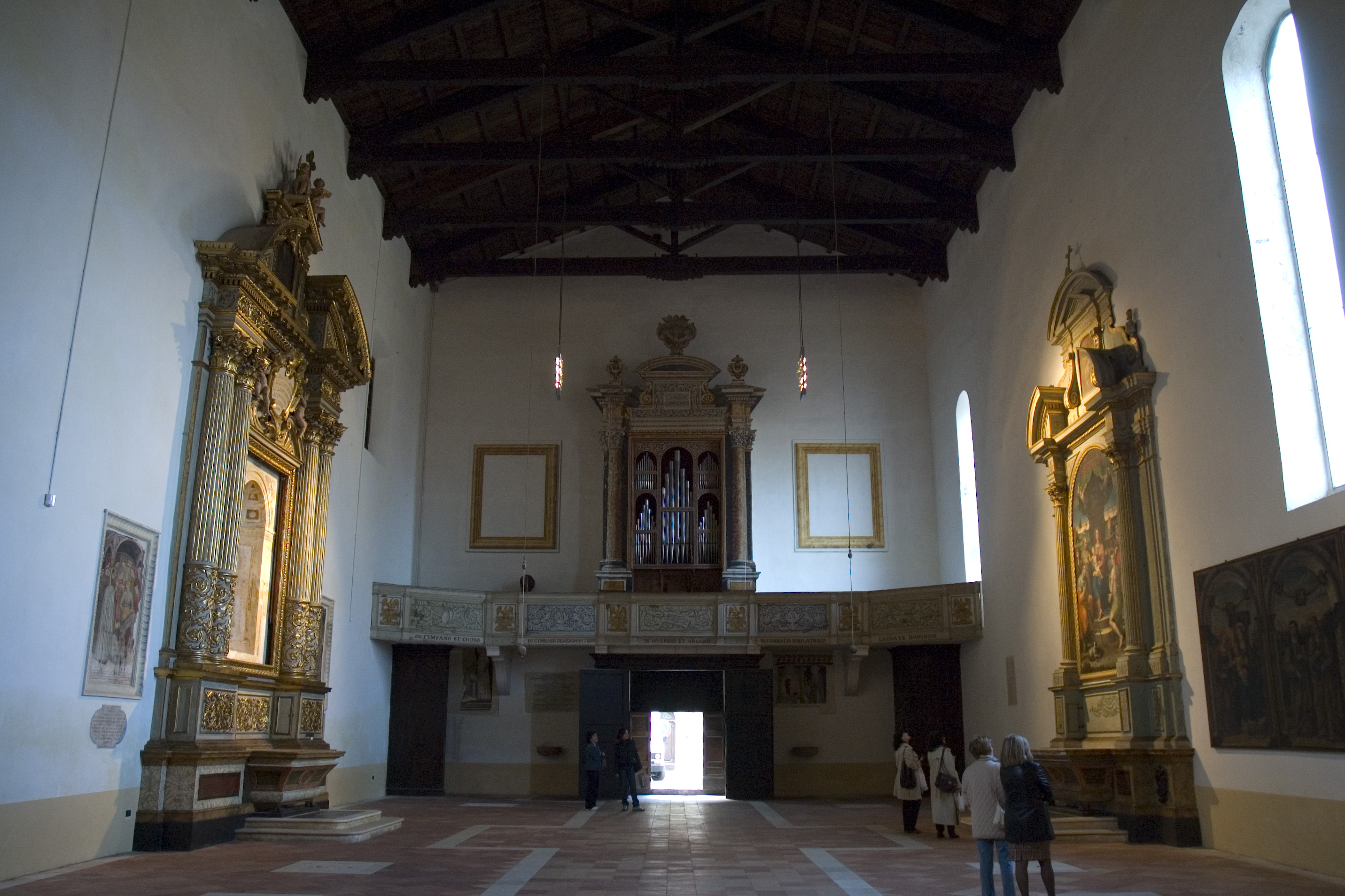 Intérieur de l'église san francesco de Cagli , Marches, Italie.